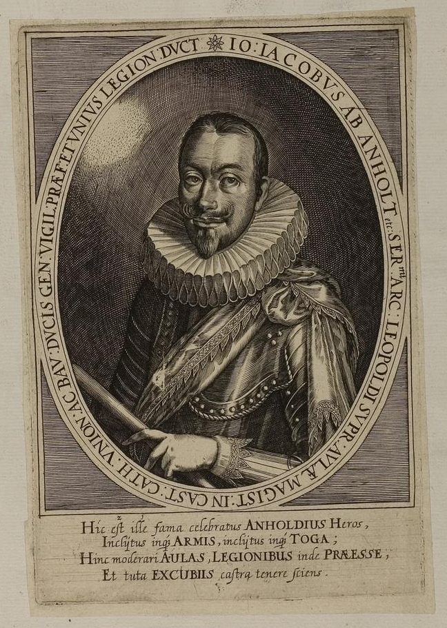 Grafik aus dem Klebeband Nr. 1 der Fürstlich Waldeckschen Hofbibliothek Arolsen Motiv: Johann Jakob von Bronckhorst-Batenburg, kaiserlicher Feldmarschall im Dreißigjährigen Krieg